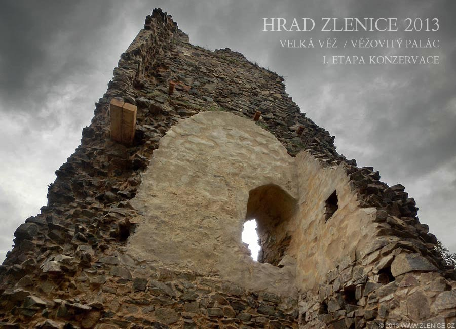 Velká věž / Věžovitý palác / hradu Zlenice, 10/2013